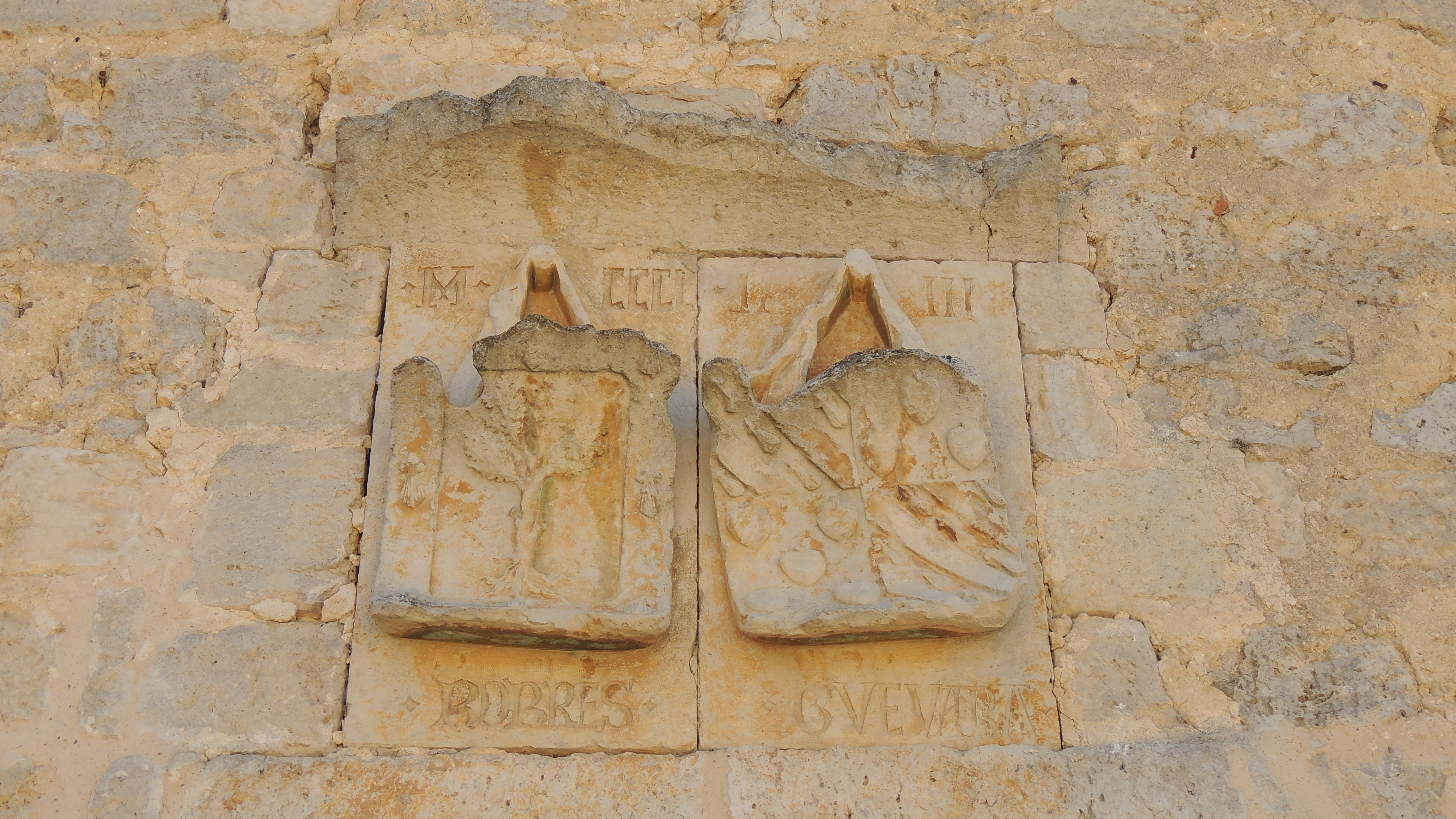 Escudos